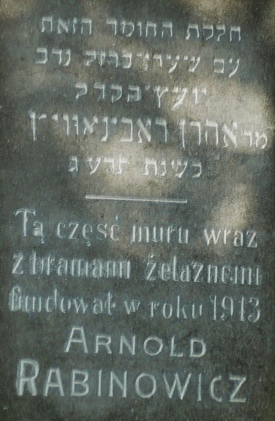 Przemyśl, nowy cmentarz żydowski